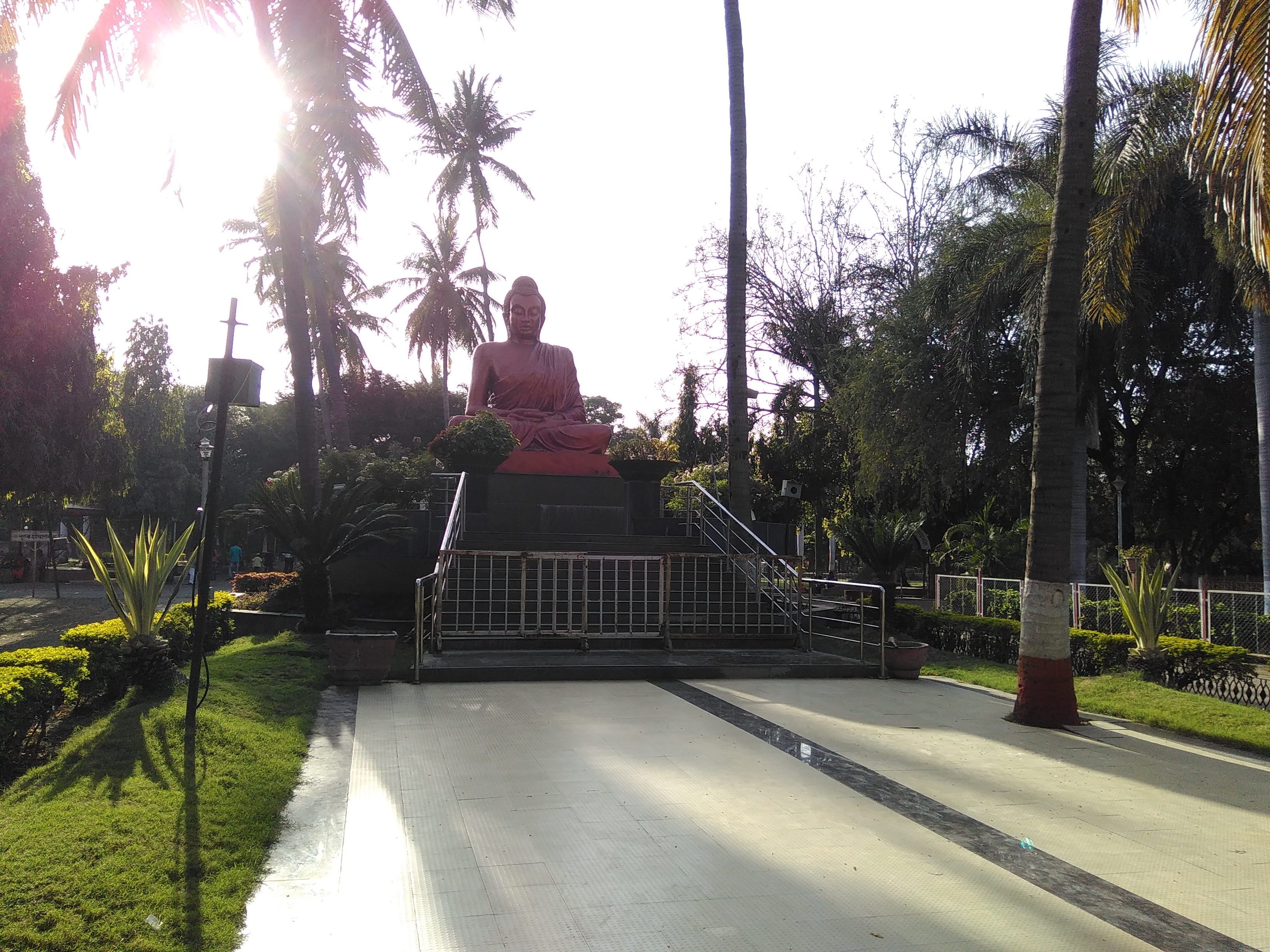 सिद्धार्थ उद्यान व प्राणिसंग्रहालयातील बुद्ध मुर्ती